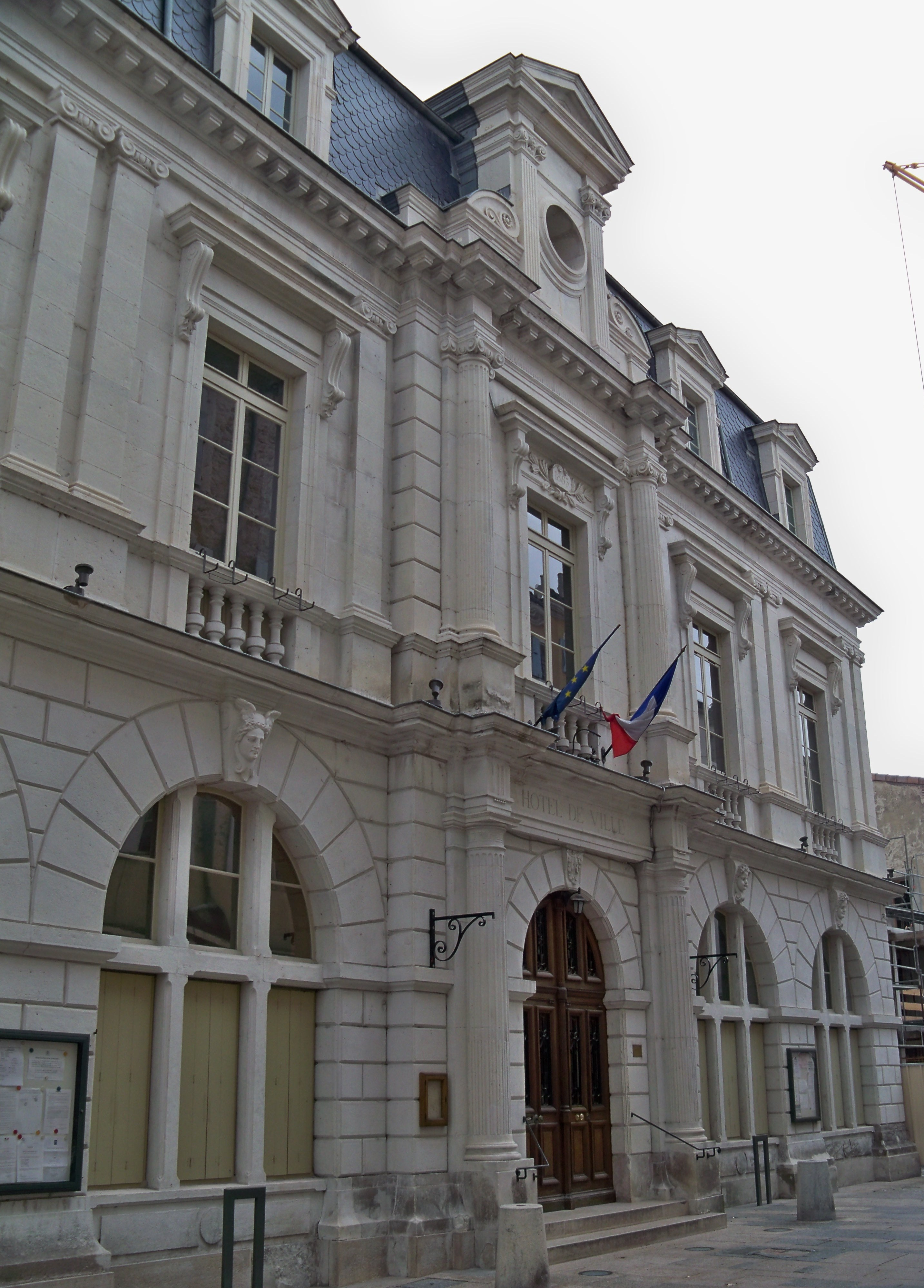 Mairie de Dieulefit (26)